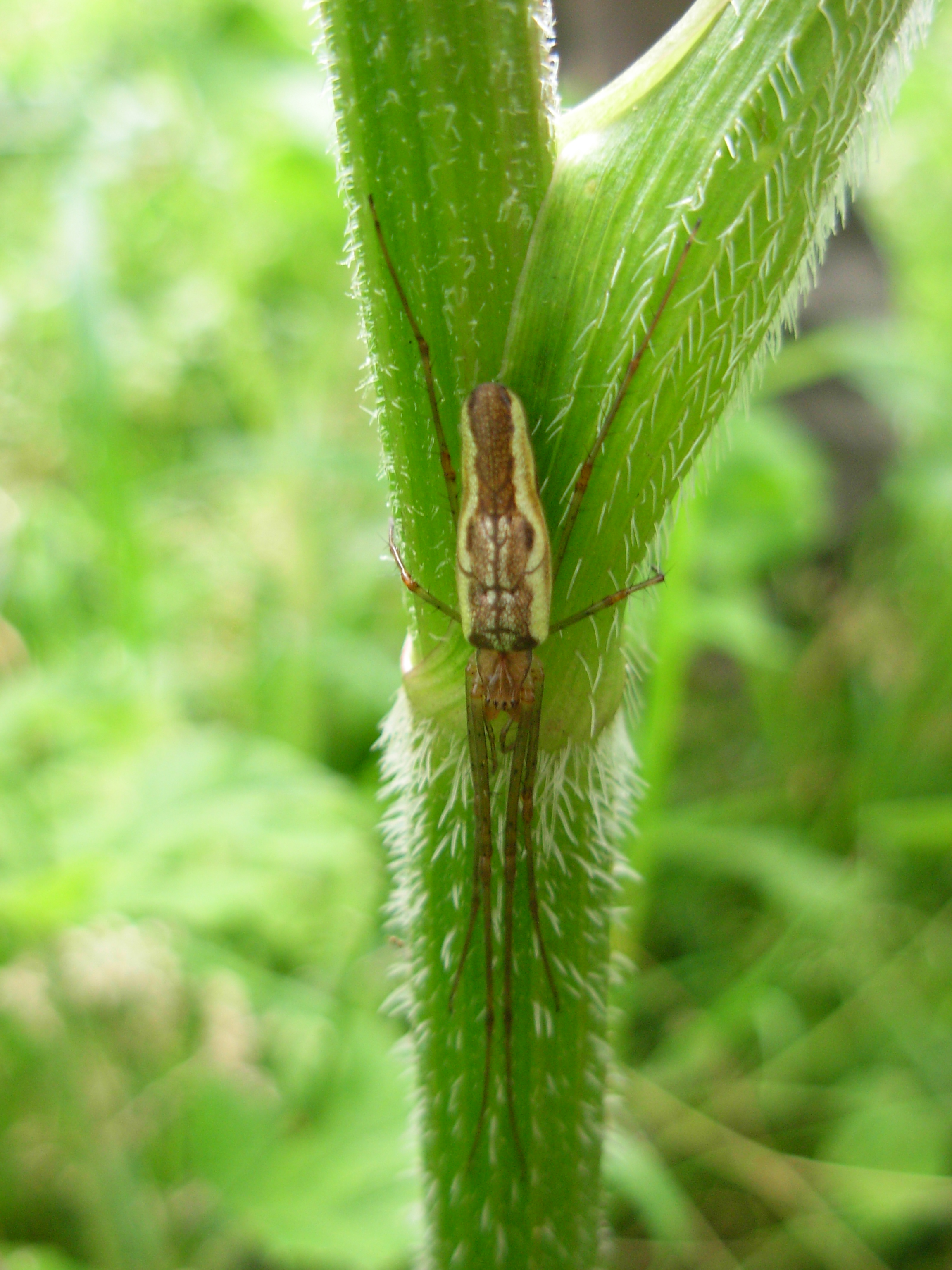 Tetragnatha extensa, Tétragnathe étirée.